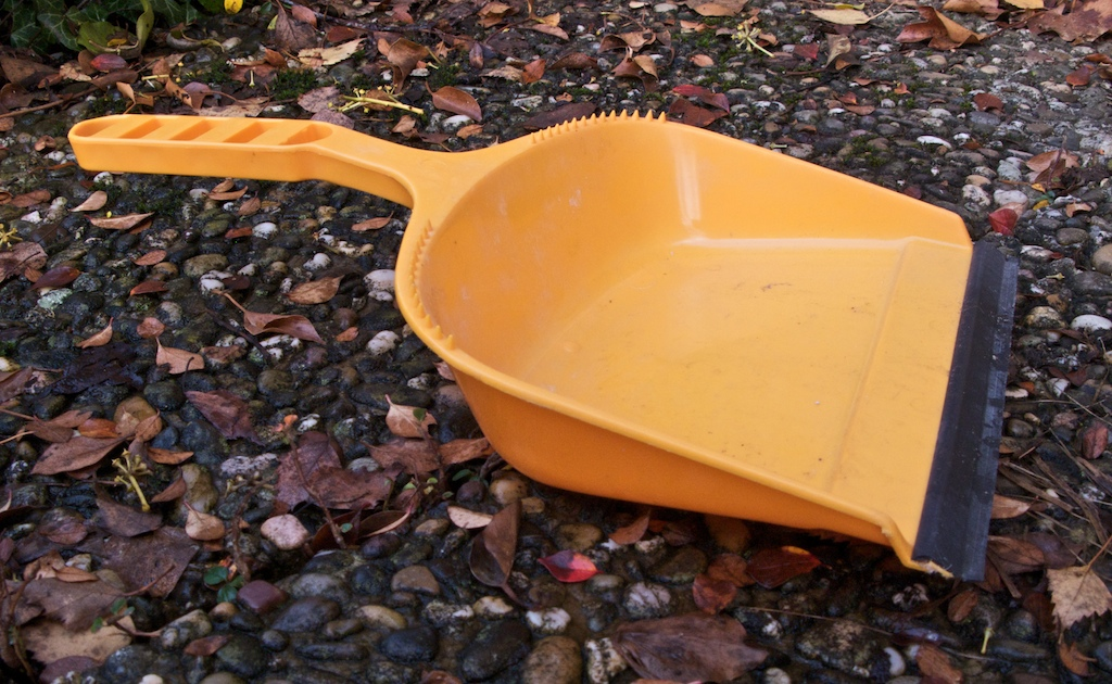 Sujet: Eng Handschëpp aus Plastik Source: Eege Foto; Fotograf Cornischong